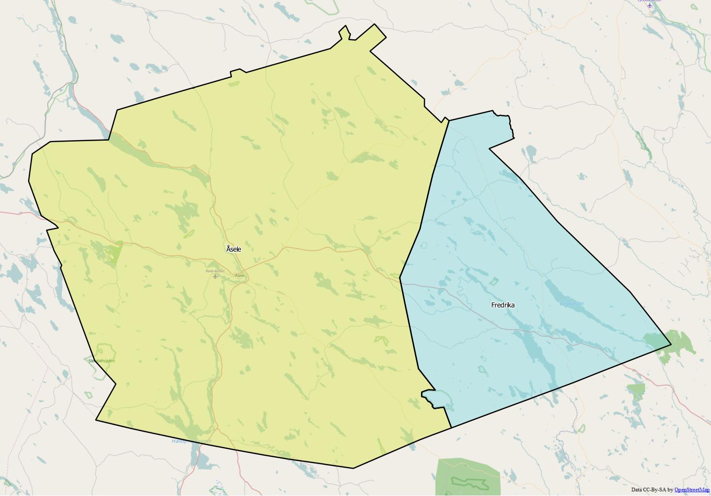 Distriktsindelningen i Åsele kommun World file 179.16644843454716352 0 0 -179.16644843454716352 1843639.26075490773655474 9492380.95556597039103508